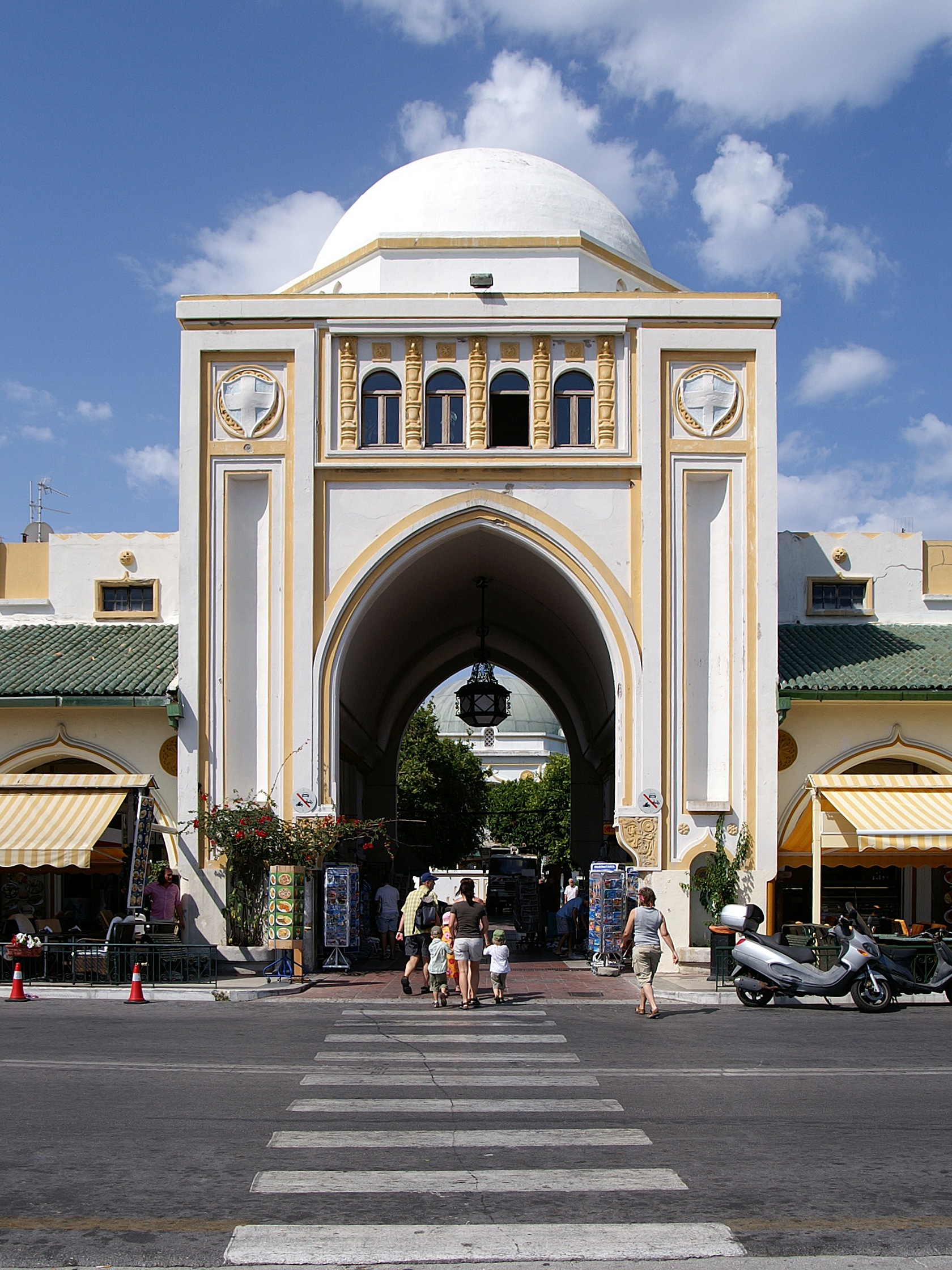 Das Eingangstor des Hafenmarktes; Blick vom Mandraki-Hafen in Rhodos Stadt.